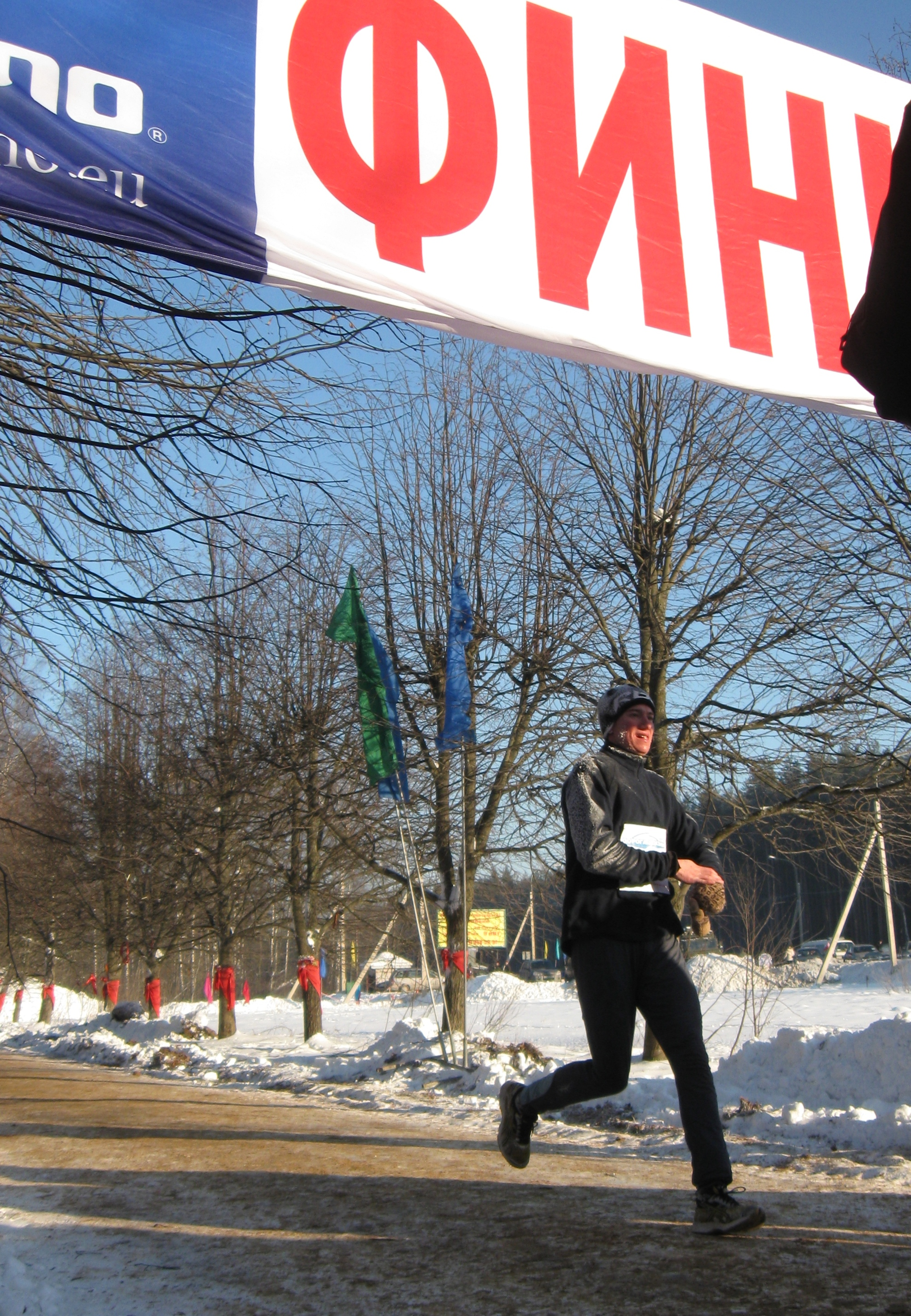 43-й международный зимний марафон «Дорога жизни», посвященный 68-й годовщине полного снятия блокады Ленинграда (2012). Финиш марафонцев на аллее Дружбы у мемориала "Цветок жизни".